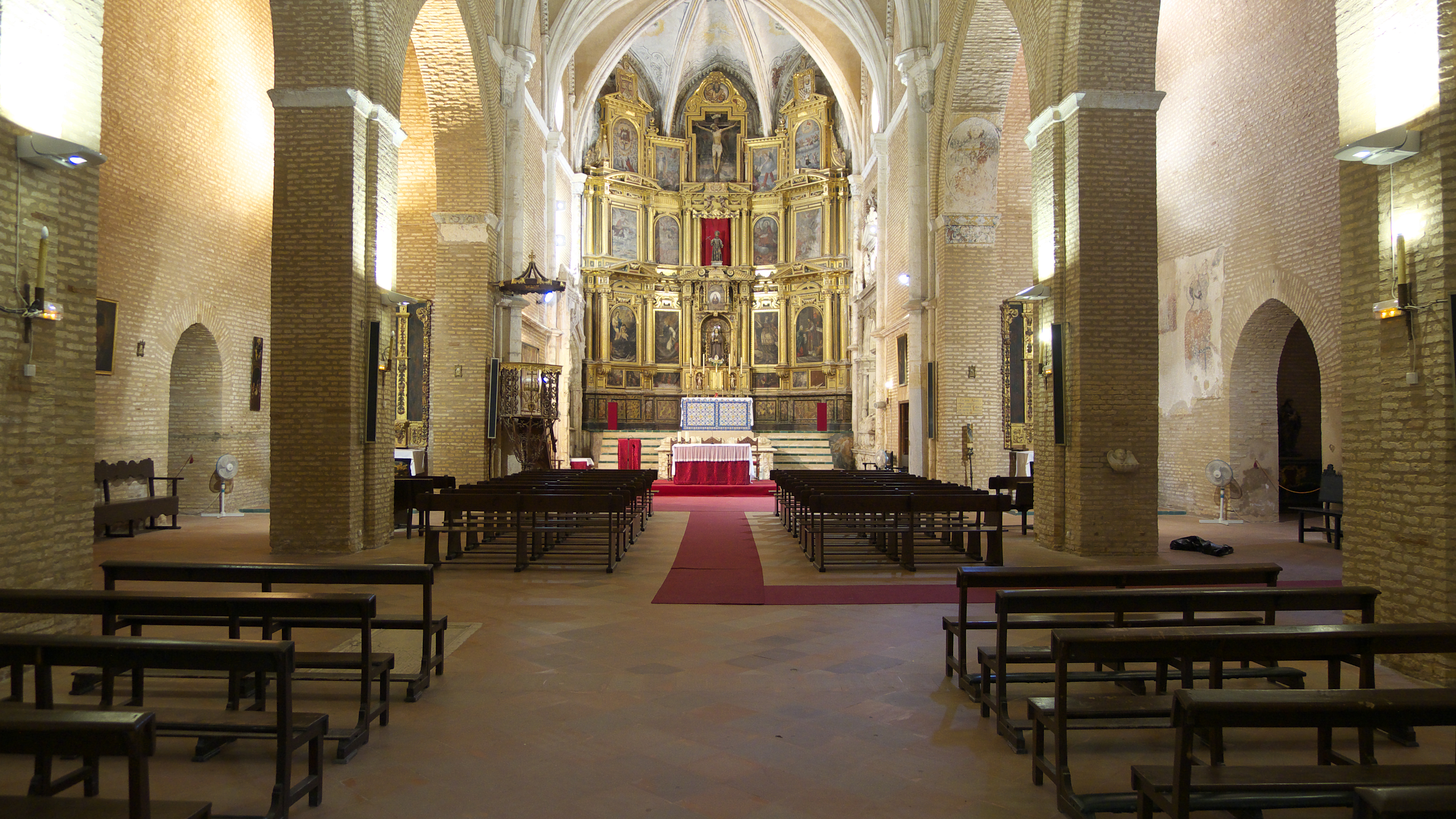 Monasterio de Santa Clara. La influencia del modelo del gótico cisterciense del Rey Sabio queda en este magnífico templo, cuyas características, se apartan de lo exigido por la praxis monacal.